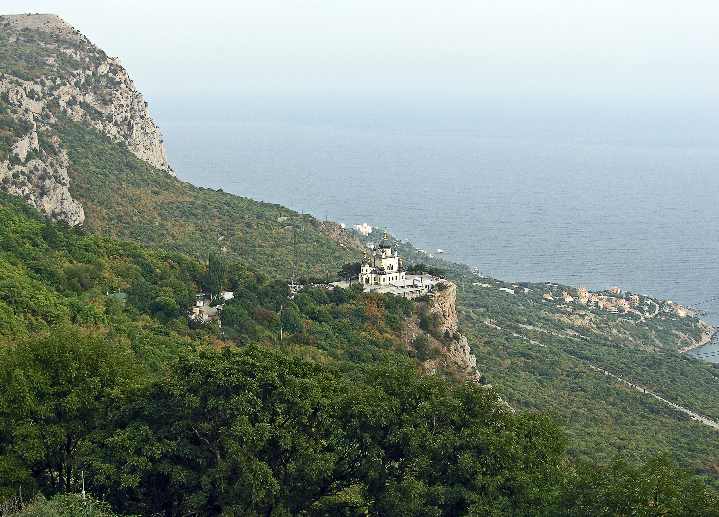 Форосская (Байдарская) церковь вознесения на фоне пгт.Форос